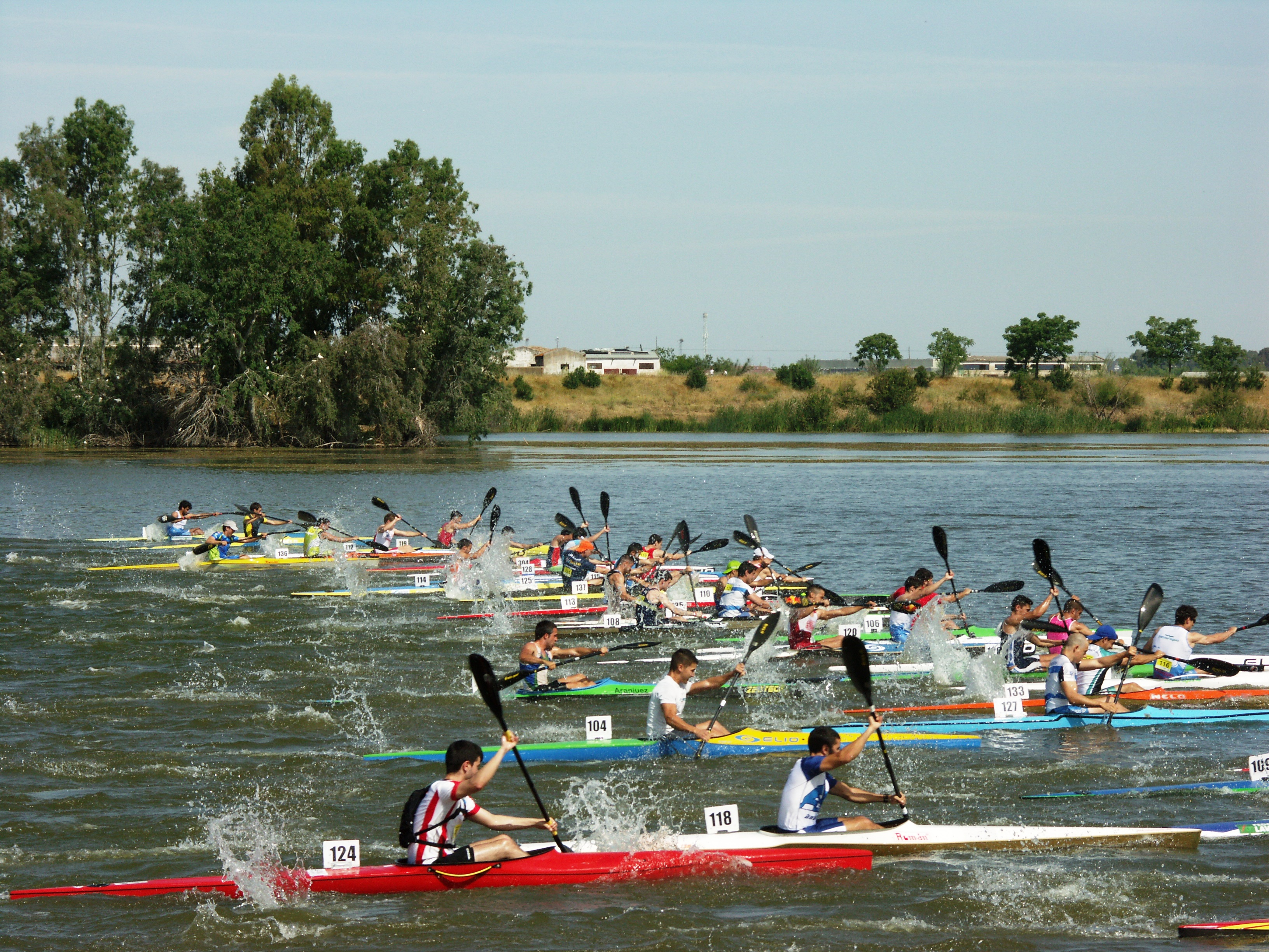 Piragüismo-XIX Campeonato de España de maratón en piragua.